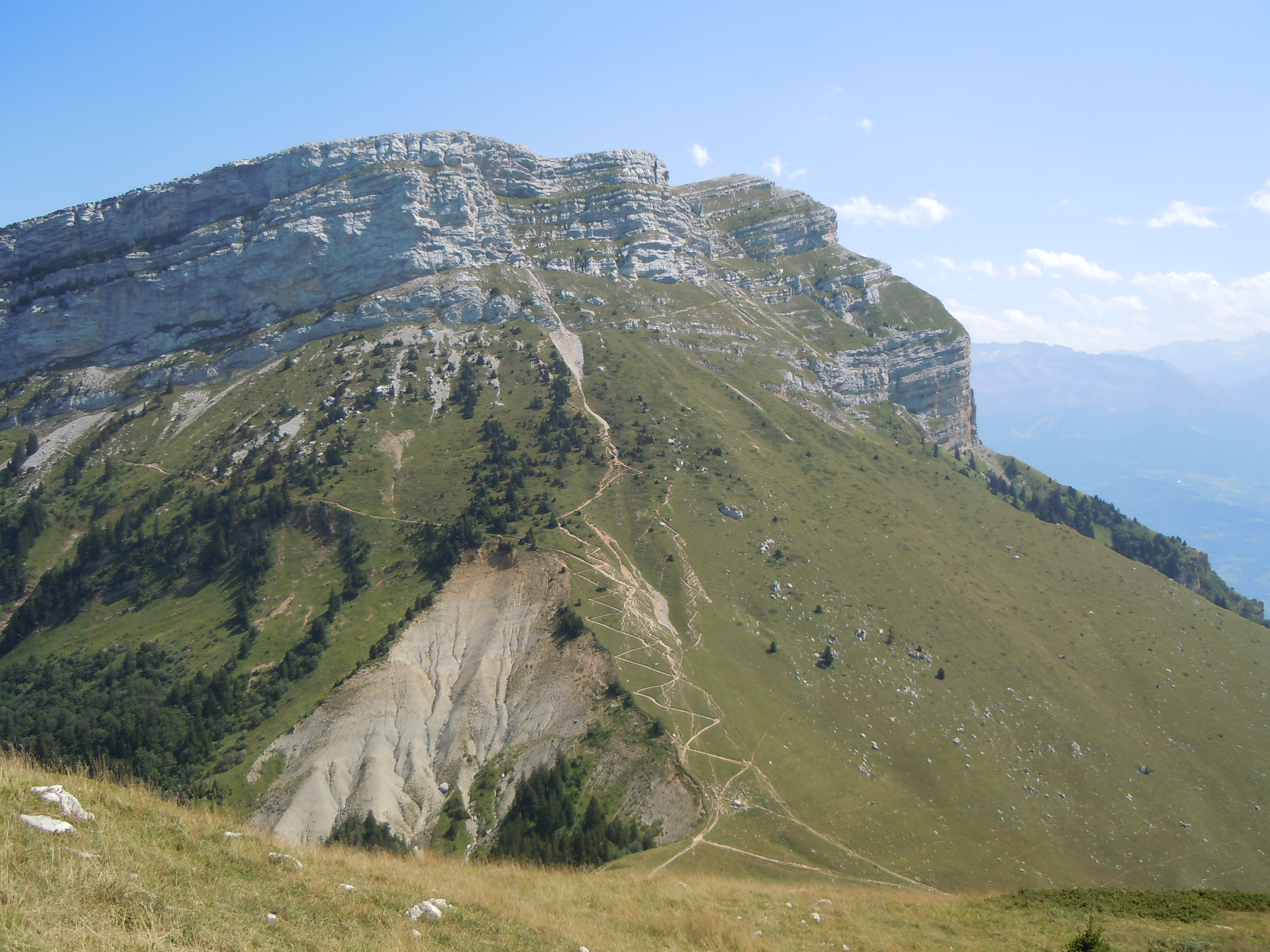 Dent de Crolles : Chemins d'accès depuis le Col des Ayes- massif de la Chartreuse - Isère - France